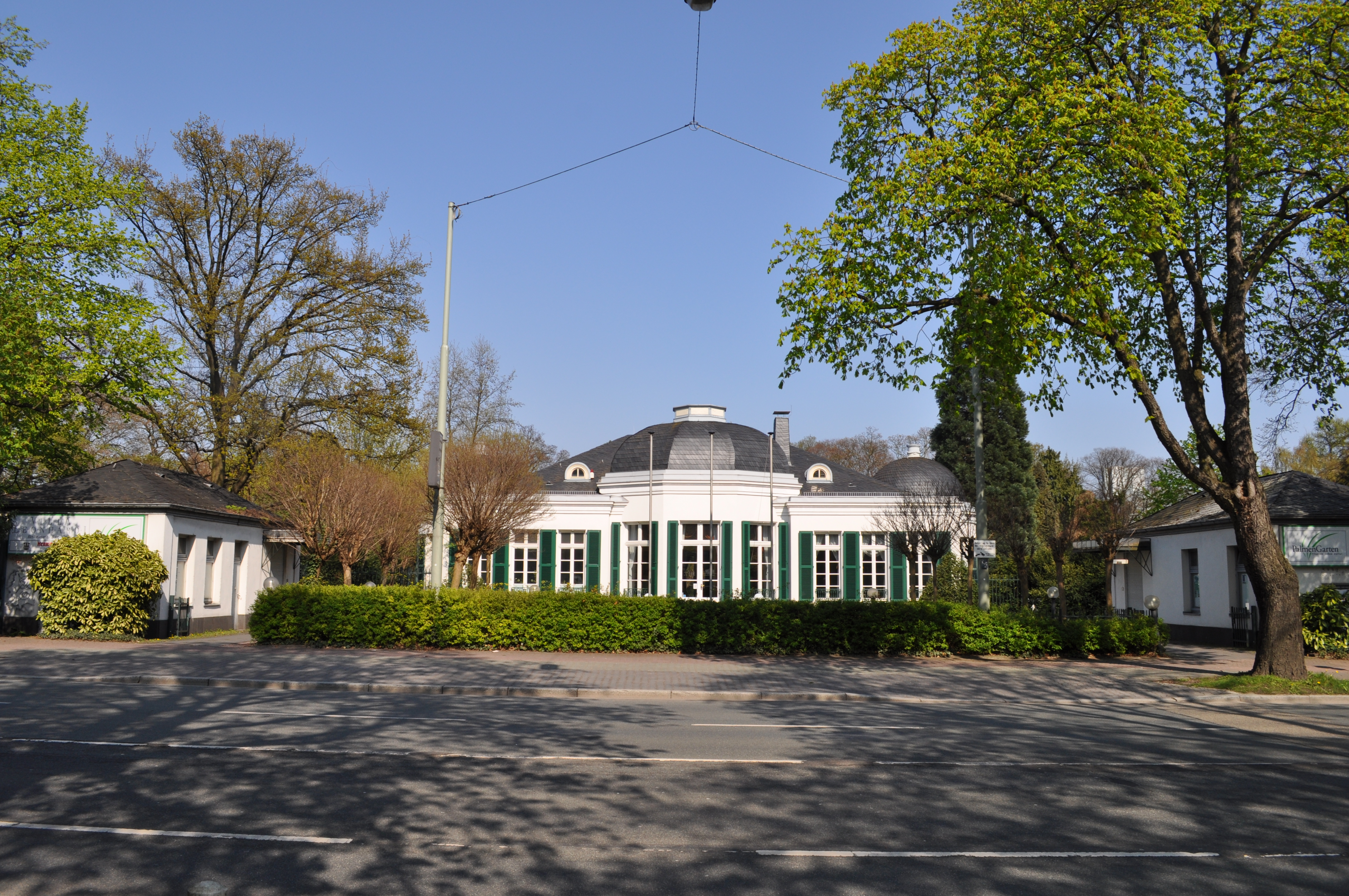 Villa Leonhardi von der Zeppelinallee aus gesehen. Wederaufgebautes Restgebäude der ehemaligen Gartenvilla Leonhardi im Bereich des Palmengartens. Johann Peter von Leonhardi (1747–1830), Frankfurter Bankier, Kaufmann, Politiker und Freimaurer. Ursprünglich stammt seine Familie aus Waldeck, er war die 2.Generation in Frankfurt. Er wurde als angesehener Bankier und Ratsherr der Stadt 1794 von Kaiser Leopold II, dem Sohn Kaiserin Maria Theresias, in dessen letztem Regierungsjahr in den Reichsgrafenstand erhoben. 1806 Bauherr der ehemaligen Villa Leonhardi in Frankfurt Westend; Käufer des sog. Leonhardischen Schlosses in Groß-Karben, das heute noch im Familienbesitz ist.